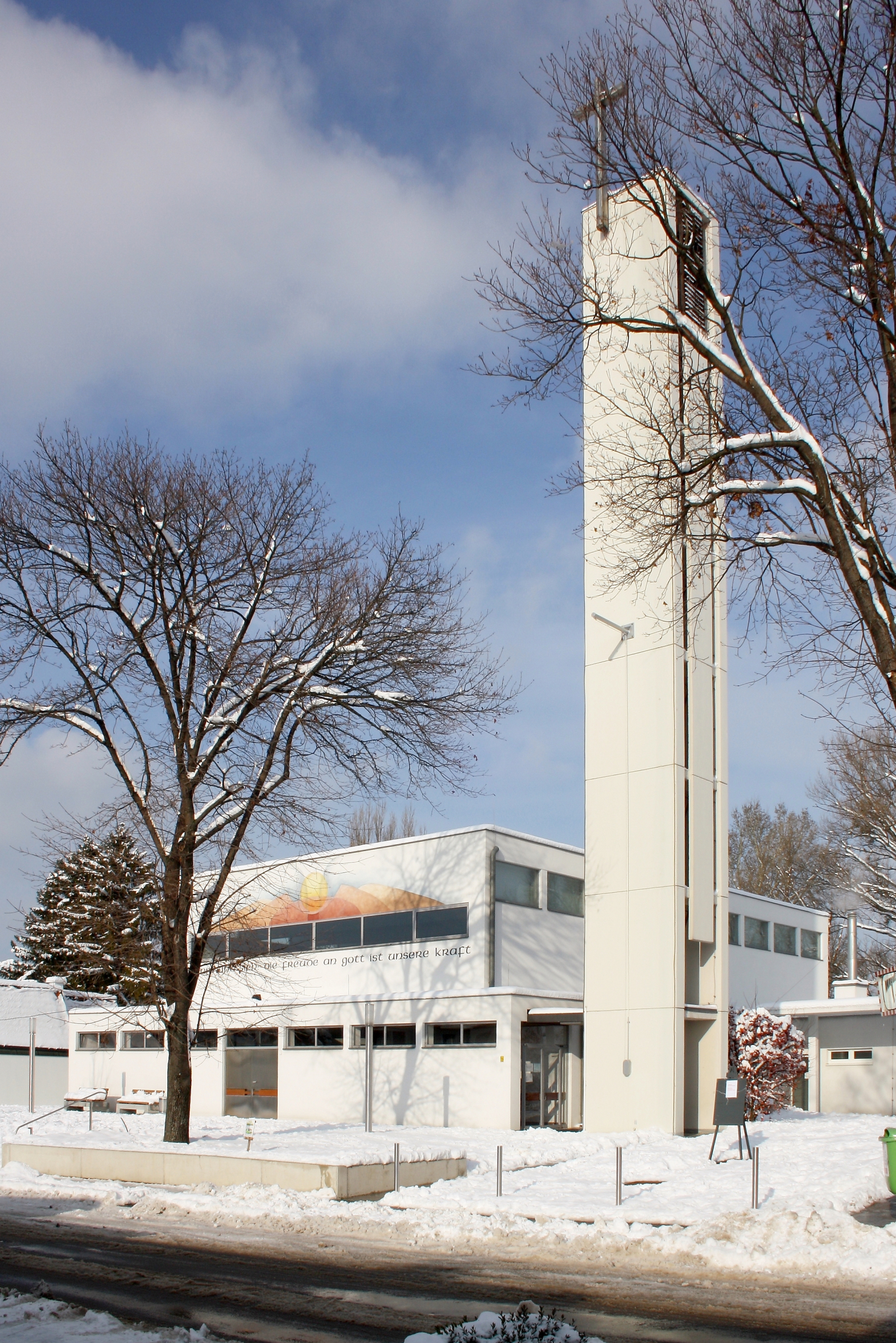 Die Außenansicht der Pfarrkirche Hl. Josef in der niederösterreichischen Marktgemeinde Guntramsdorf.